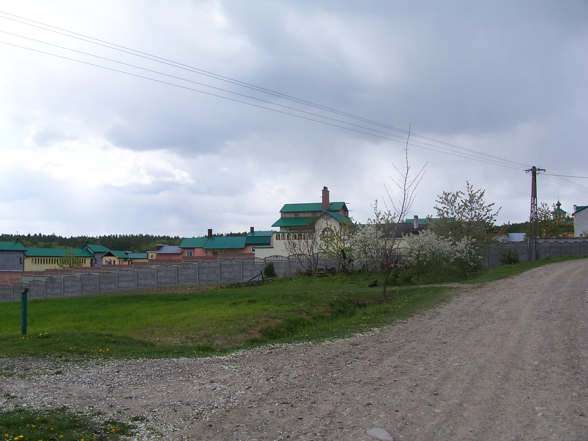 zabudowania Monastru Św. Cyryla i Metodego w Ujkowicach pod Przemyślem